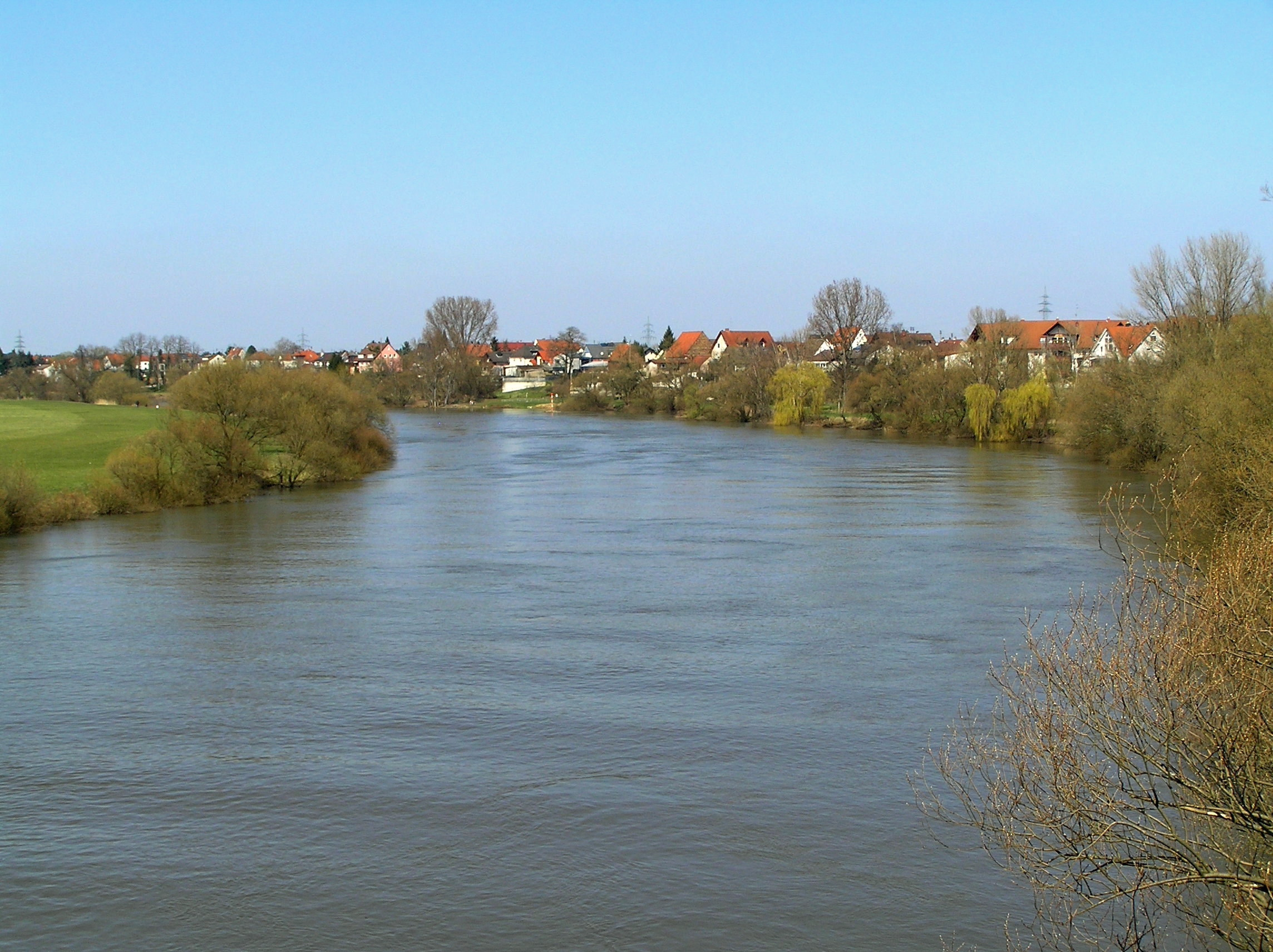 Der Main im Karlsteiner Ortsteil Dettingen. Am rechten Mainufer ist die Rückseite der Bebauung an der Hanauer Landstraße zu sehen, auf der linken Seite das Mainufer von Mainflingen (Hessen)